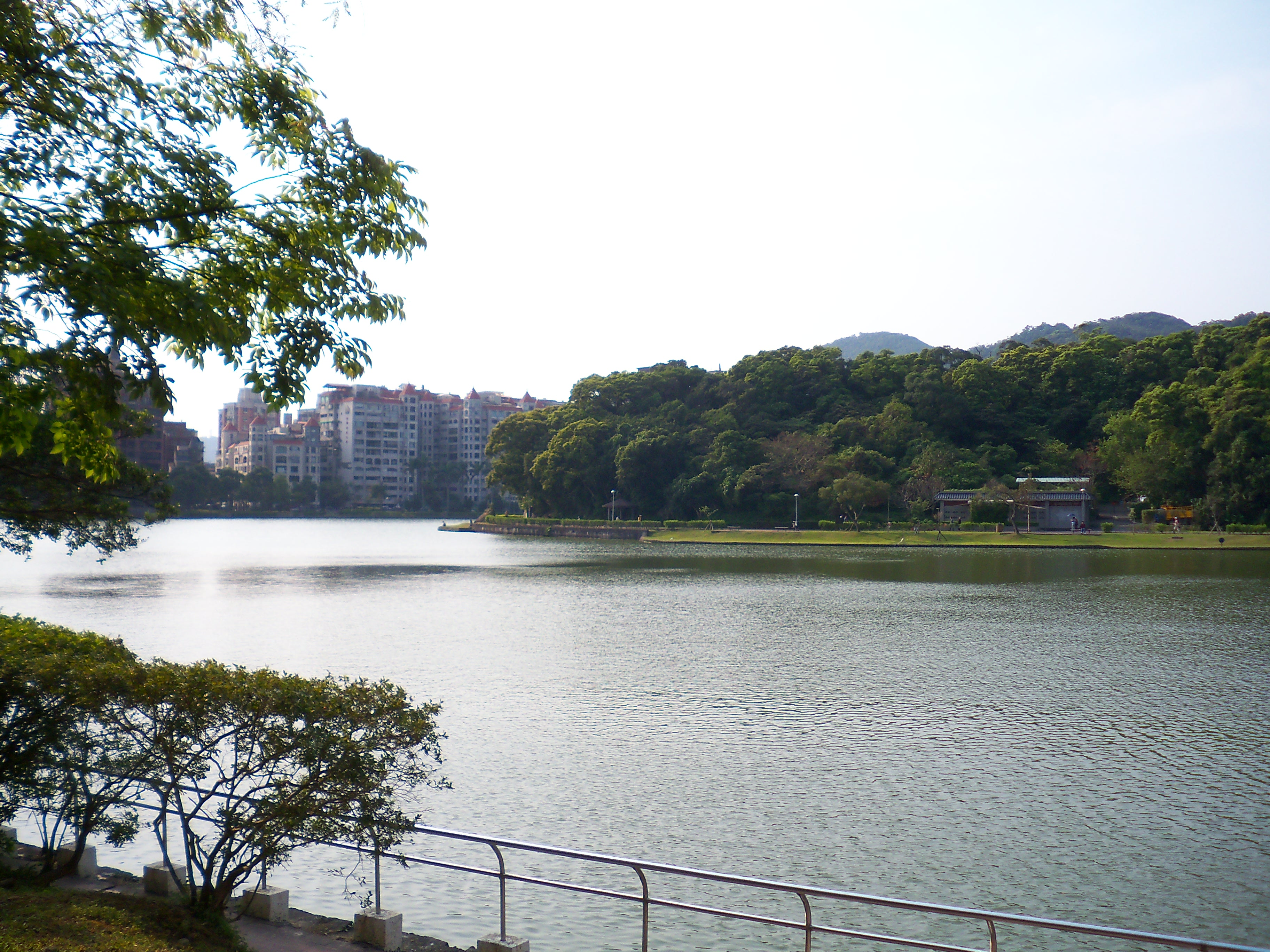 由南岸北望碧湖中段，北岸的建築是公廁。